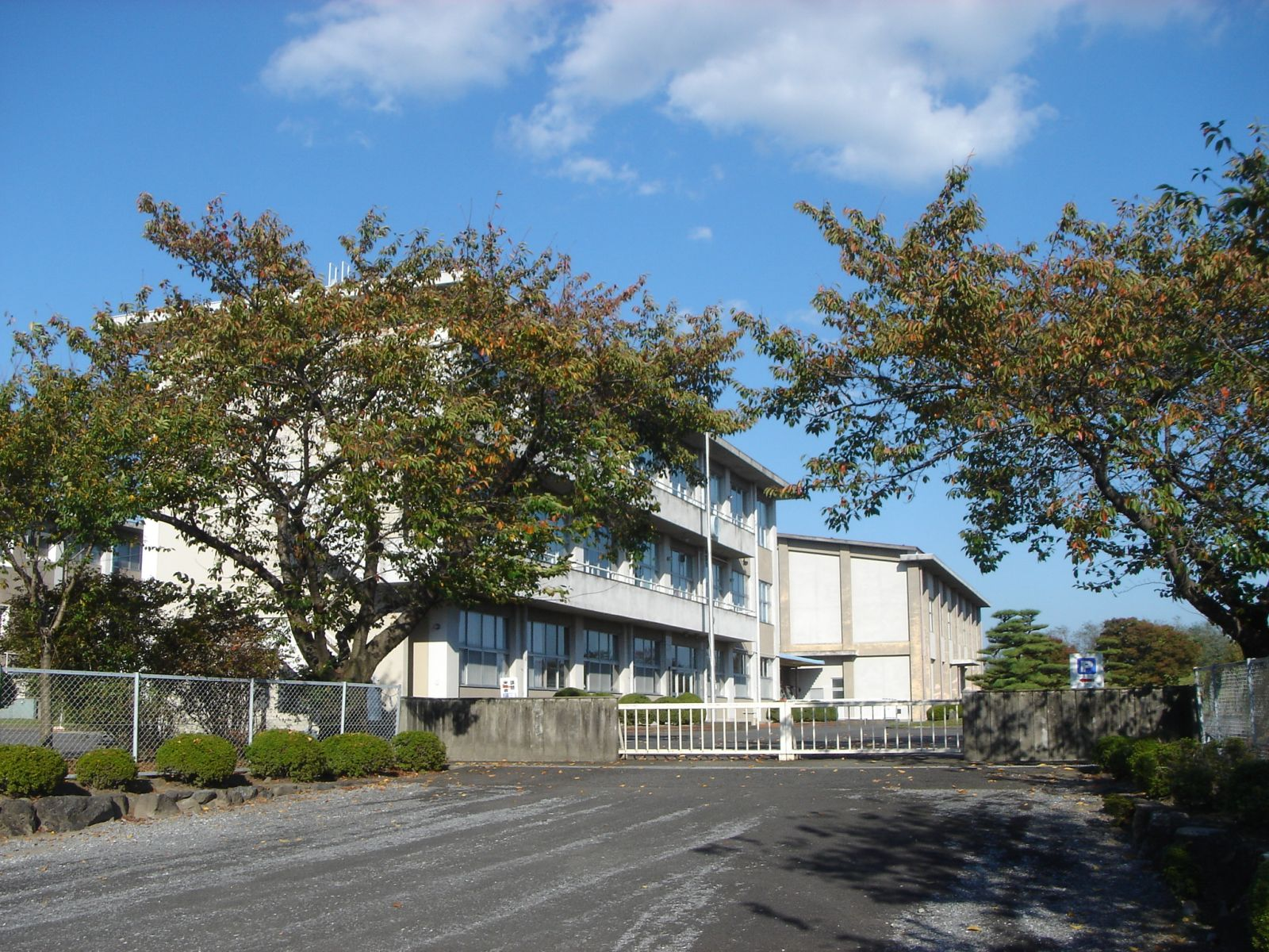 Gifu Fire Fighting Academy in Gifu Pref.（岐阜県消防学校）,Kakamigahara,Gifu,Japan(岐阜県各務原市)で撮影。